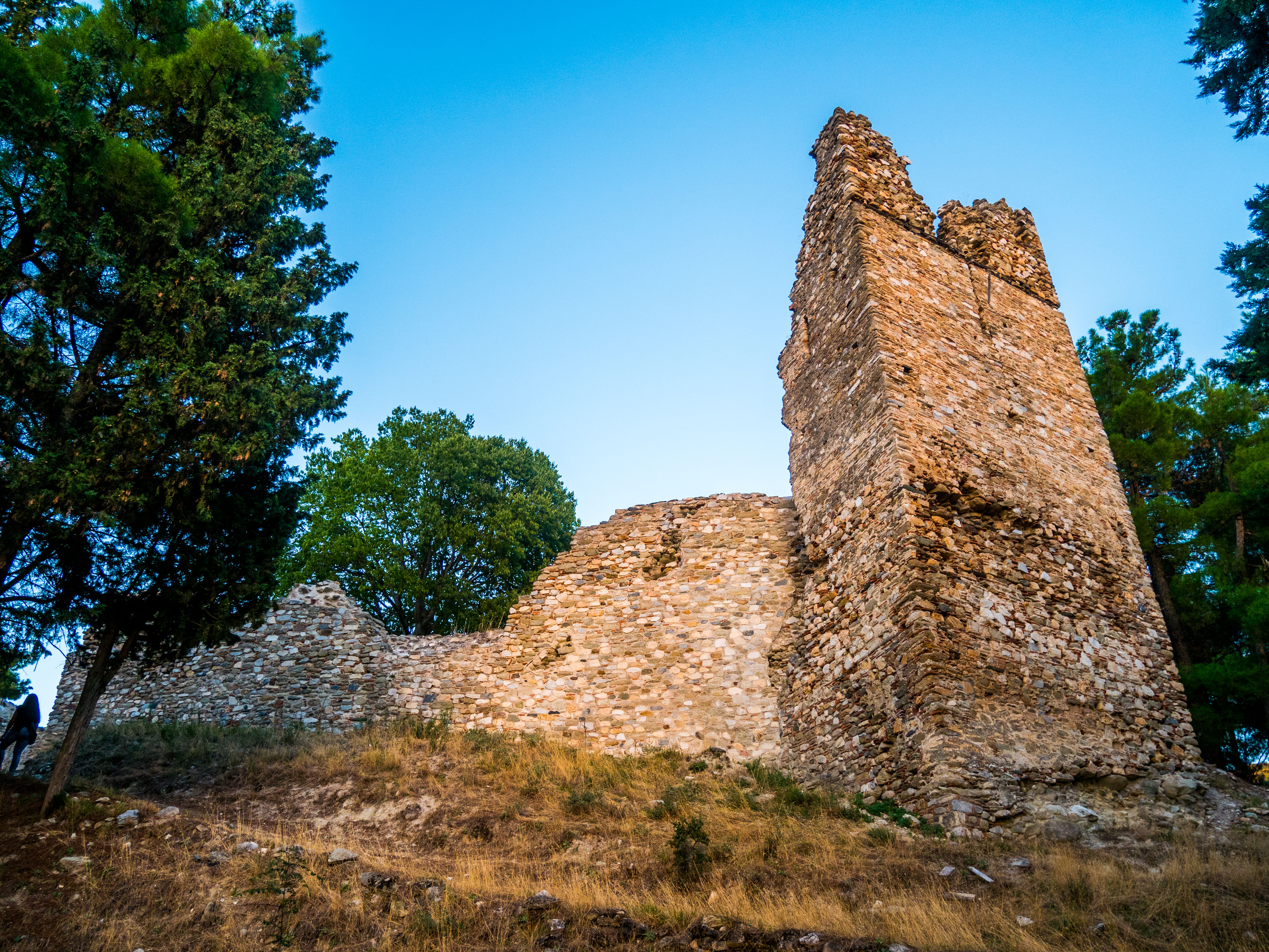 Βυζαντινό κάστρο Σερβίων«Βυζαντινό κάστρο Σερβίων»